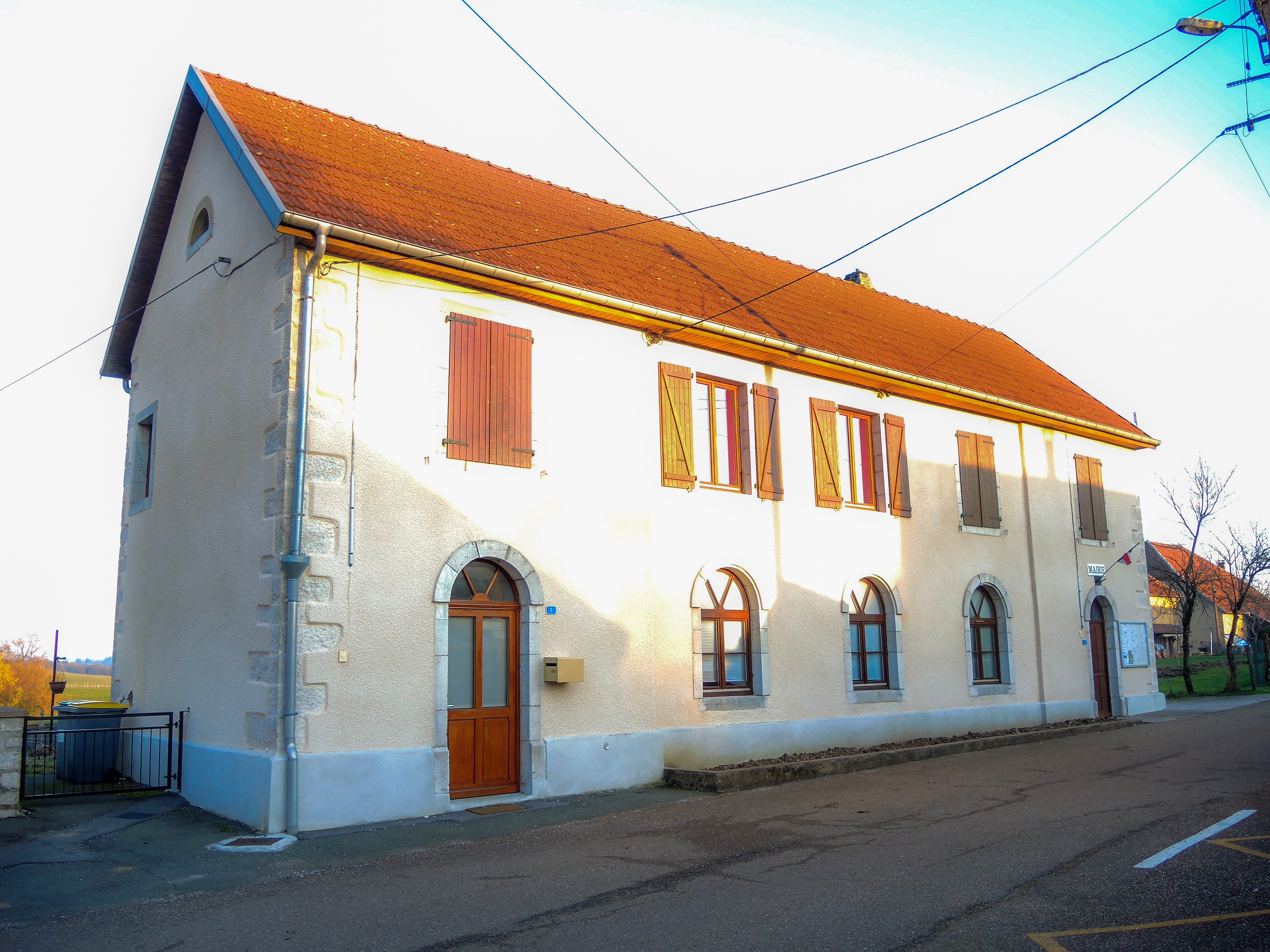 Mairie du village de Brétigney-Notre-Dame. Doubs